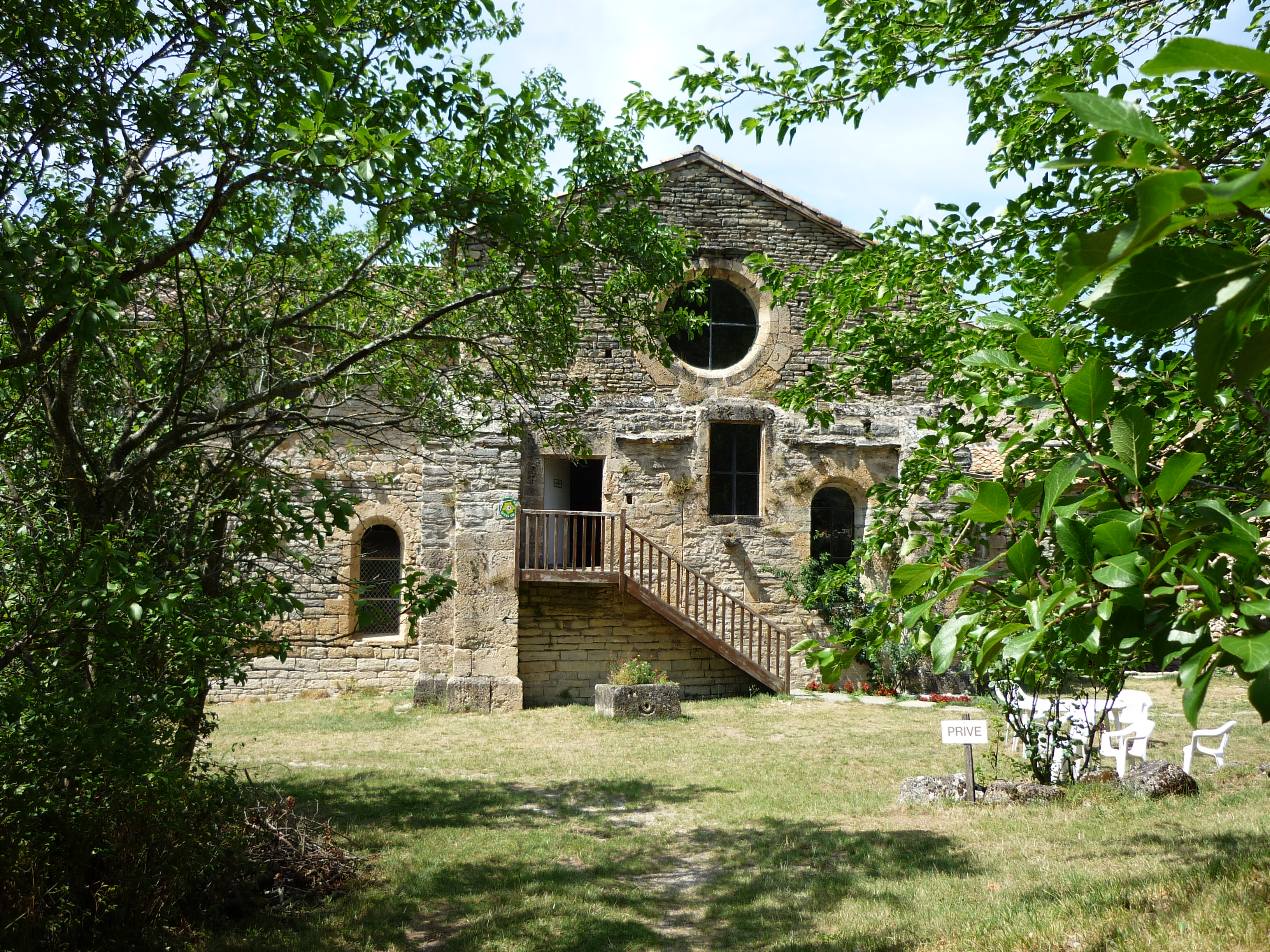 Kloster Valcroissant, ehem. Kirche von Osten